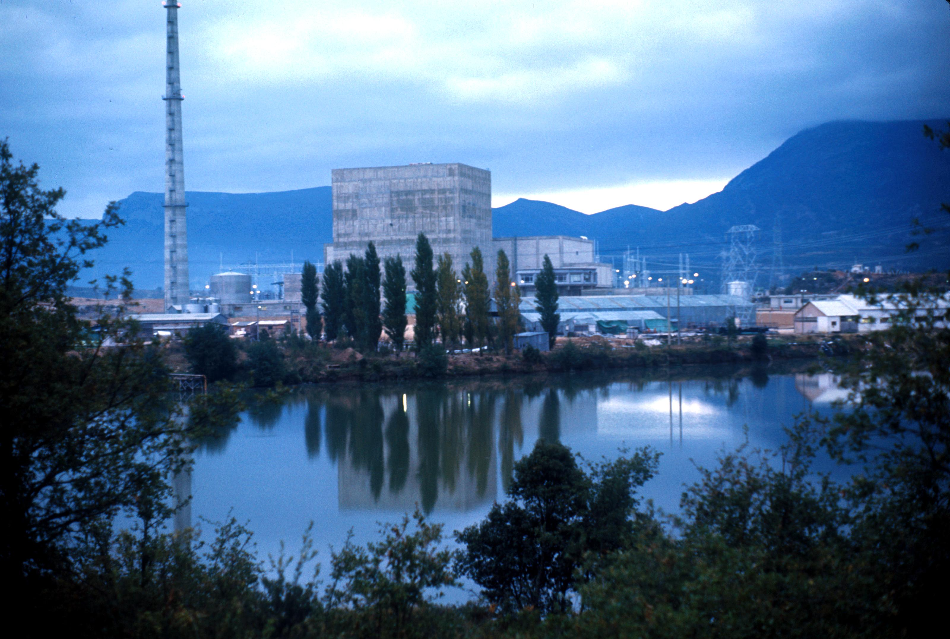 Santa María de Garoña Nuclear Power Plant.